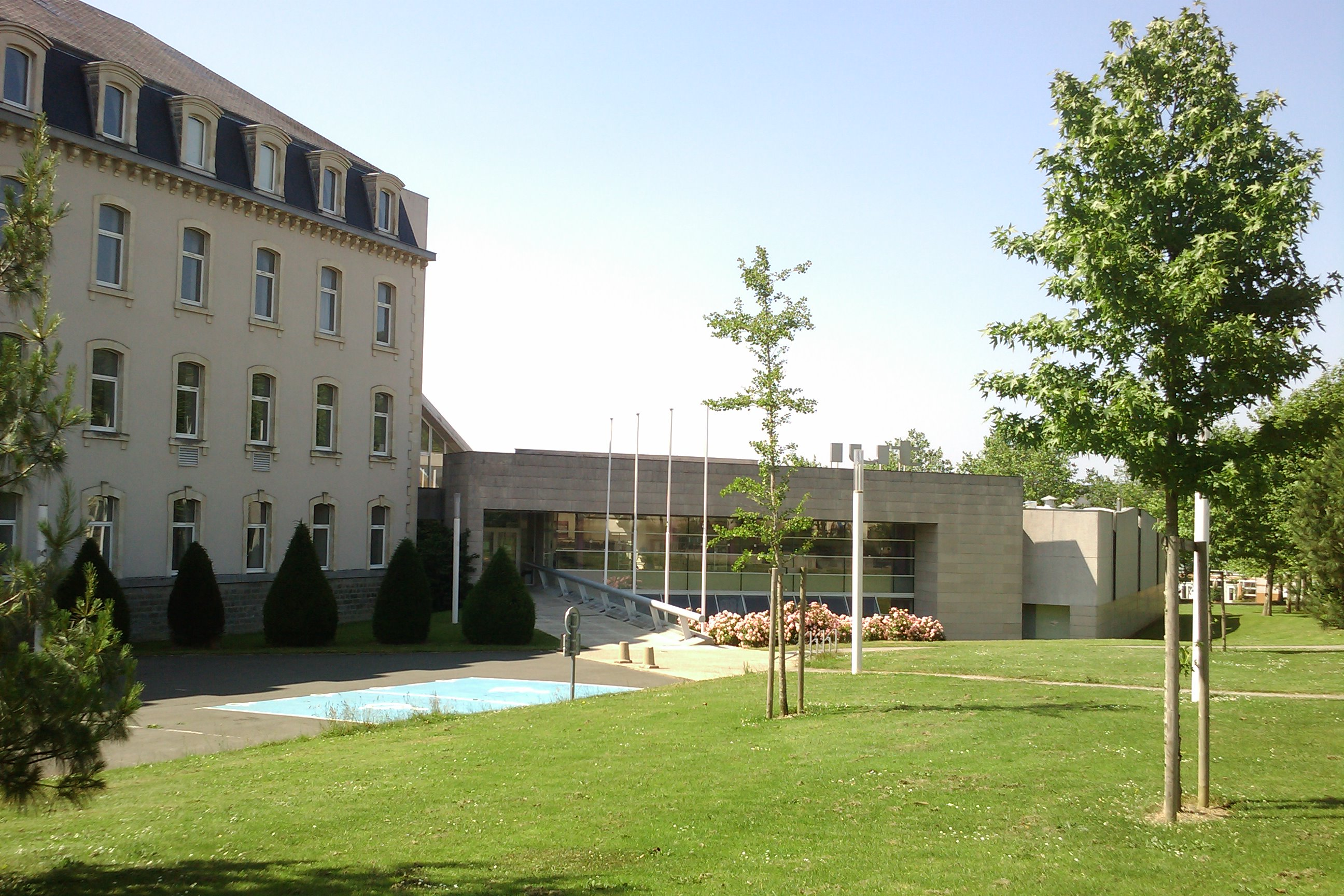 Antenne saint-loise de l'IUT de Cherbourg-Manche